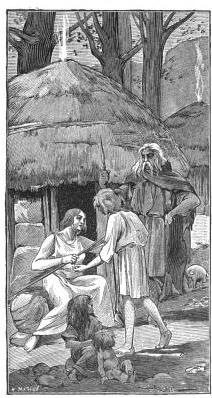 Illustration tirée de Histoire de France, cours élémentaire, Ernest Lavisse, Armand Colin, 1913, page 2 de l'éditon Heath de 1919